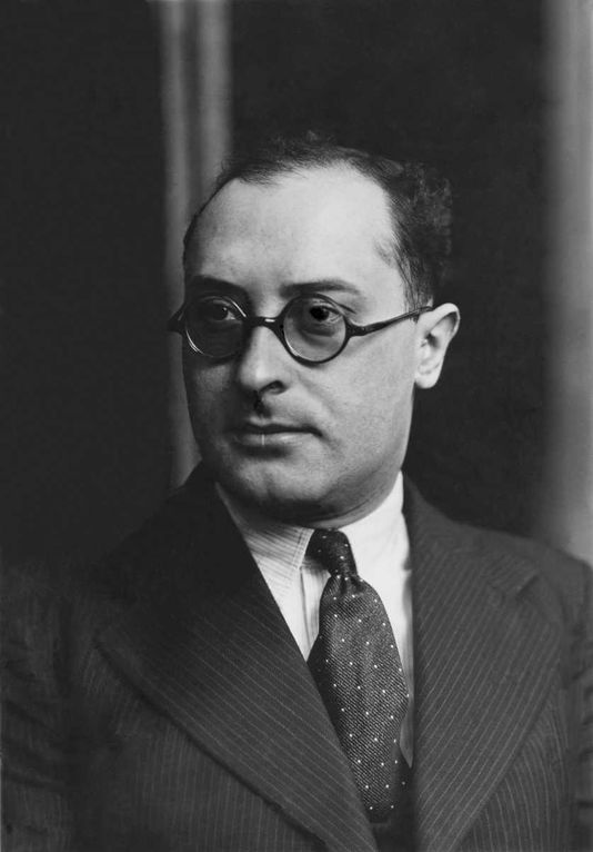 Jean Zay vers 1936.